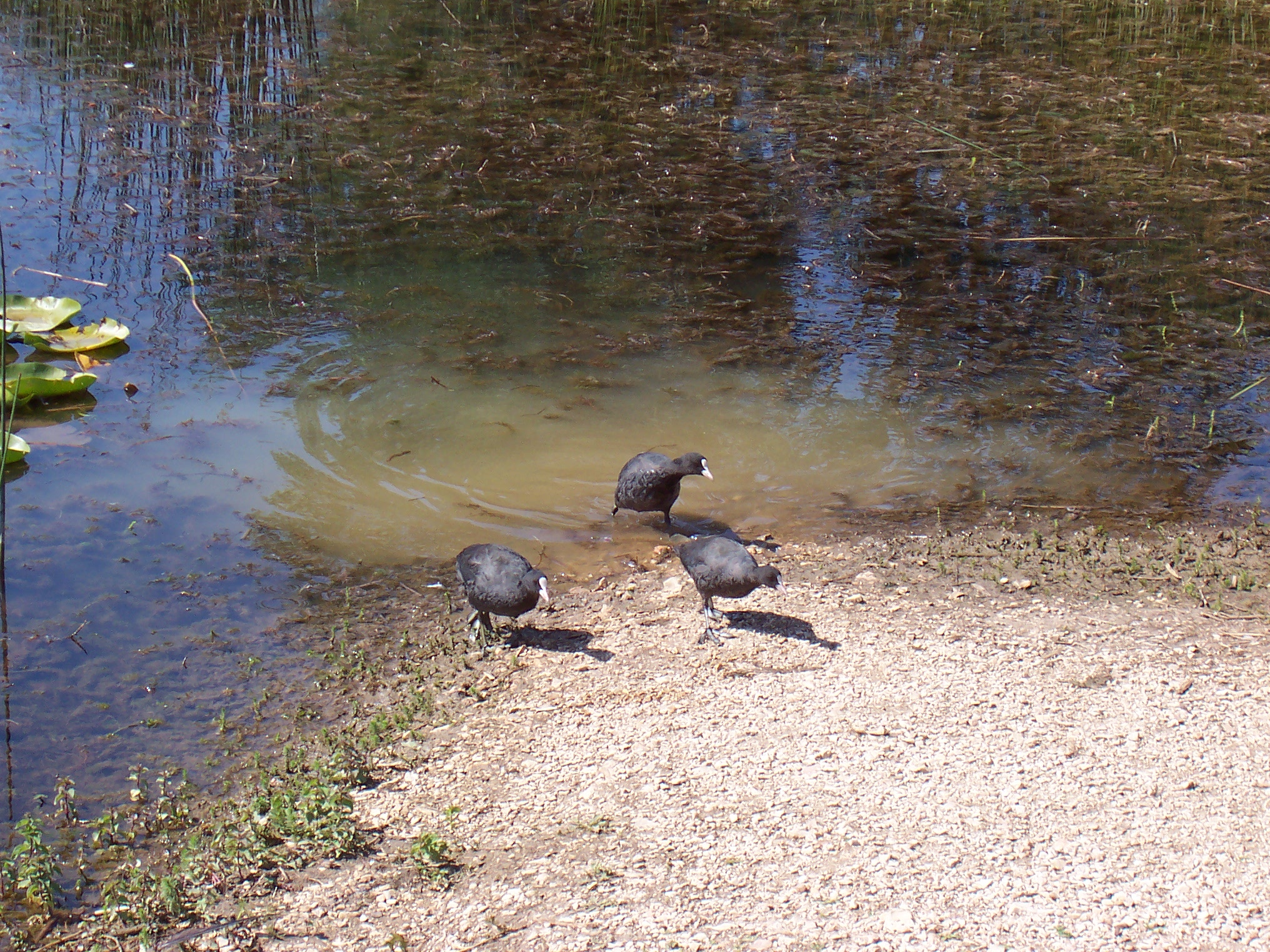 Gallinelle dell'Oasi di Colfiorito